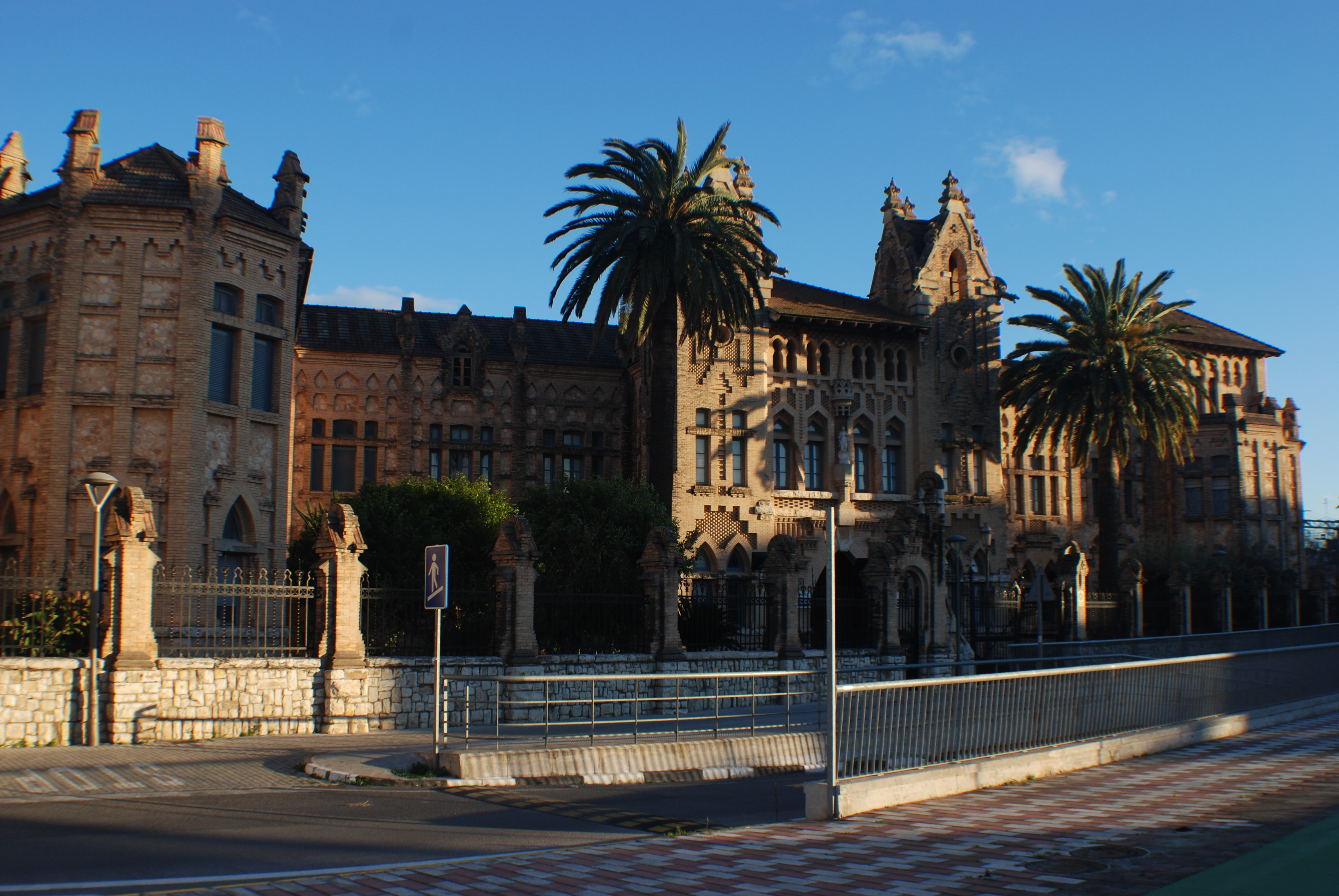 Asil d'ancians de Sueca